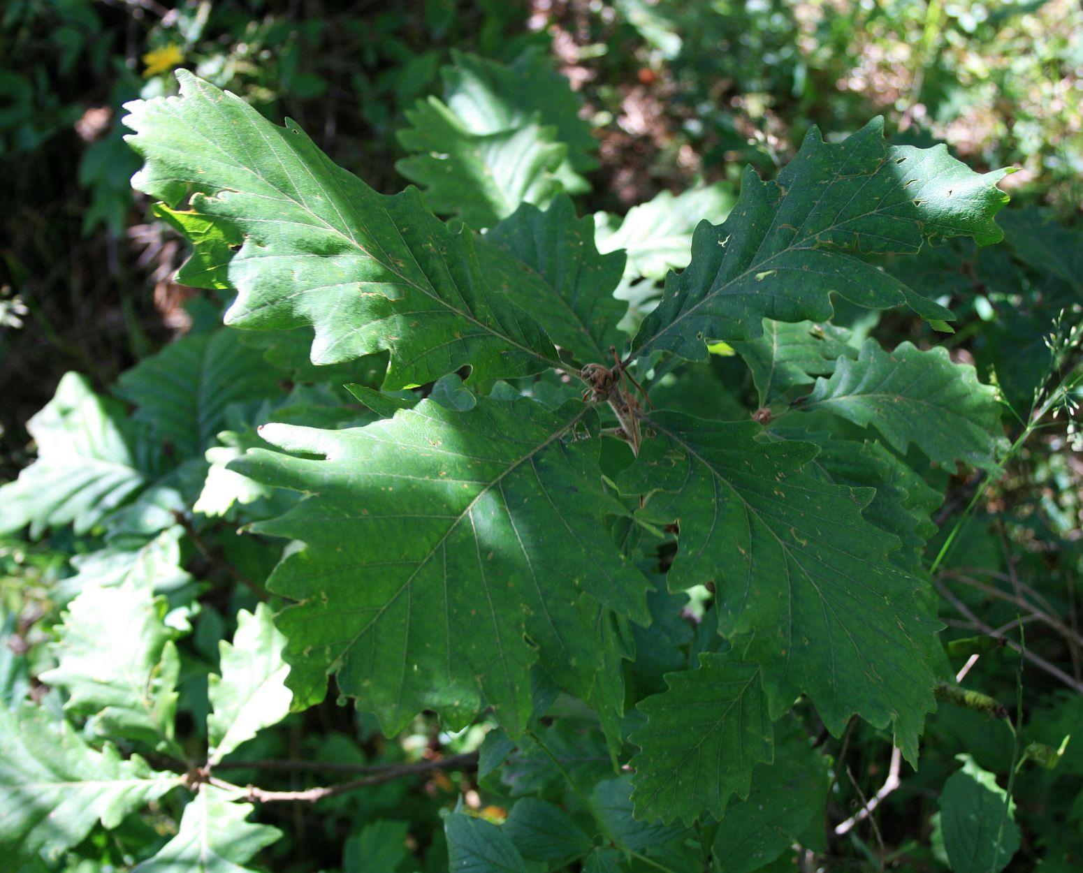 Quercus macranthera, Buchengewächse (Fagaceae) – Georgien/საქართველო: Kleiner Kaukasus, ober der Straße zum Tskhratskaro-Pass, ca. 5 km SW Bakuriani/ბაკურიანი, ca. 1940 m s.m.